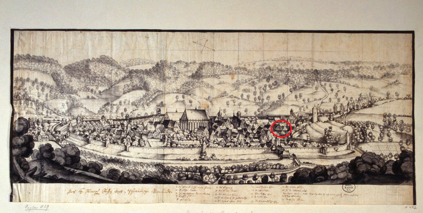 Um 1640: Hans Joachim Henneberger erstellt eine Vorzeichnung zum Stich von Matthäus Merian von 1646. Hervorhebung des Gebäudes im Judenhof, das vormals Synagoge gewesen sein könnte durch Gmünder.